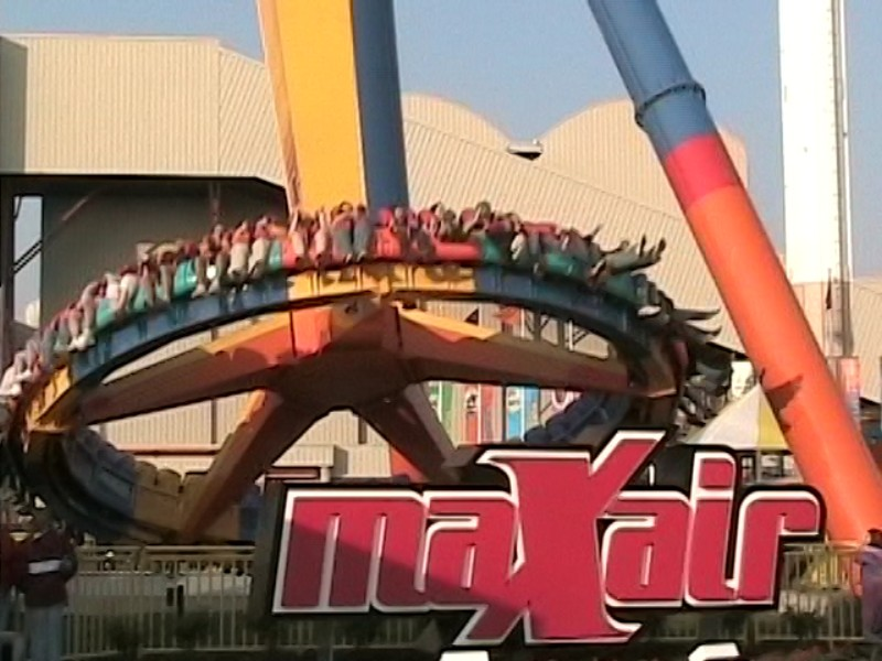 MaXair